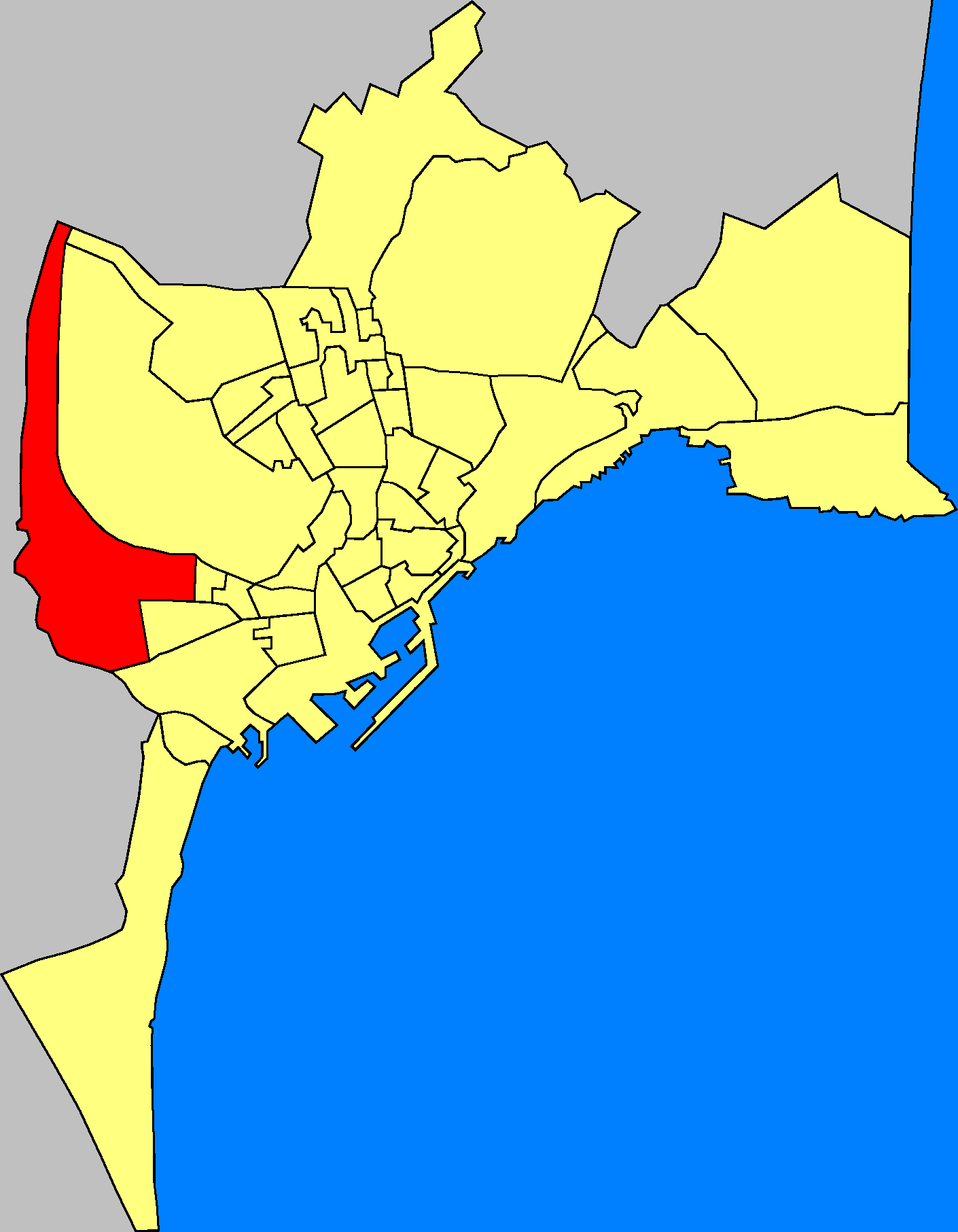 Barrios de la ciudad de Alicante